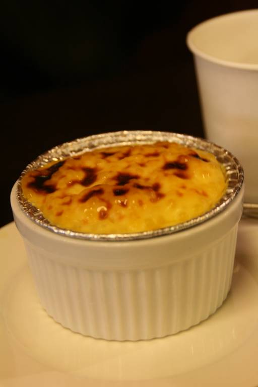 A custard dessert